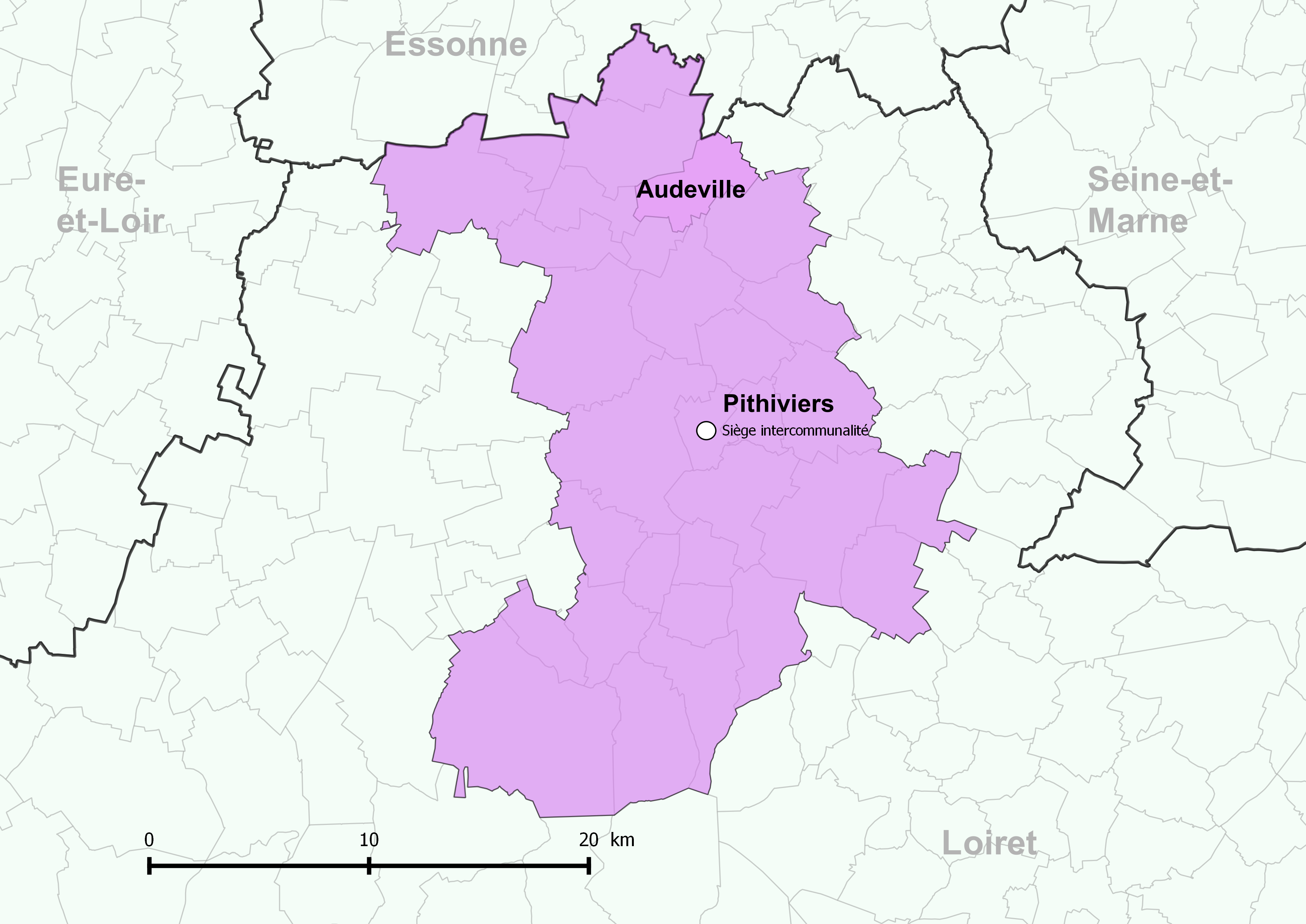 Périmètre de la communauté de communes du Pithiverais - Positionnement de la commune d'Audeville.